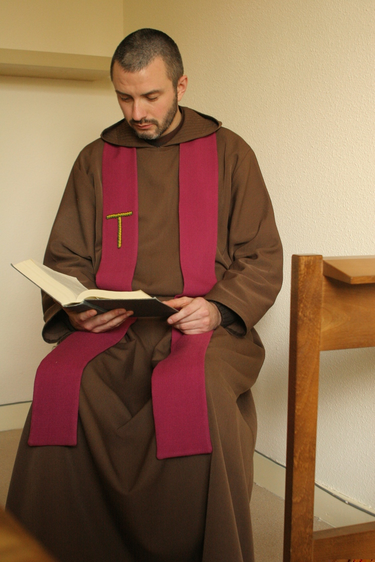 Confession par le frère Eric Bidot